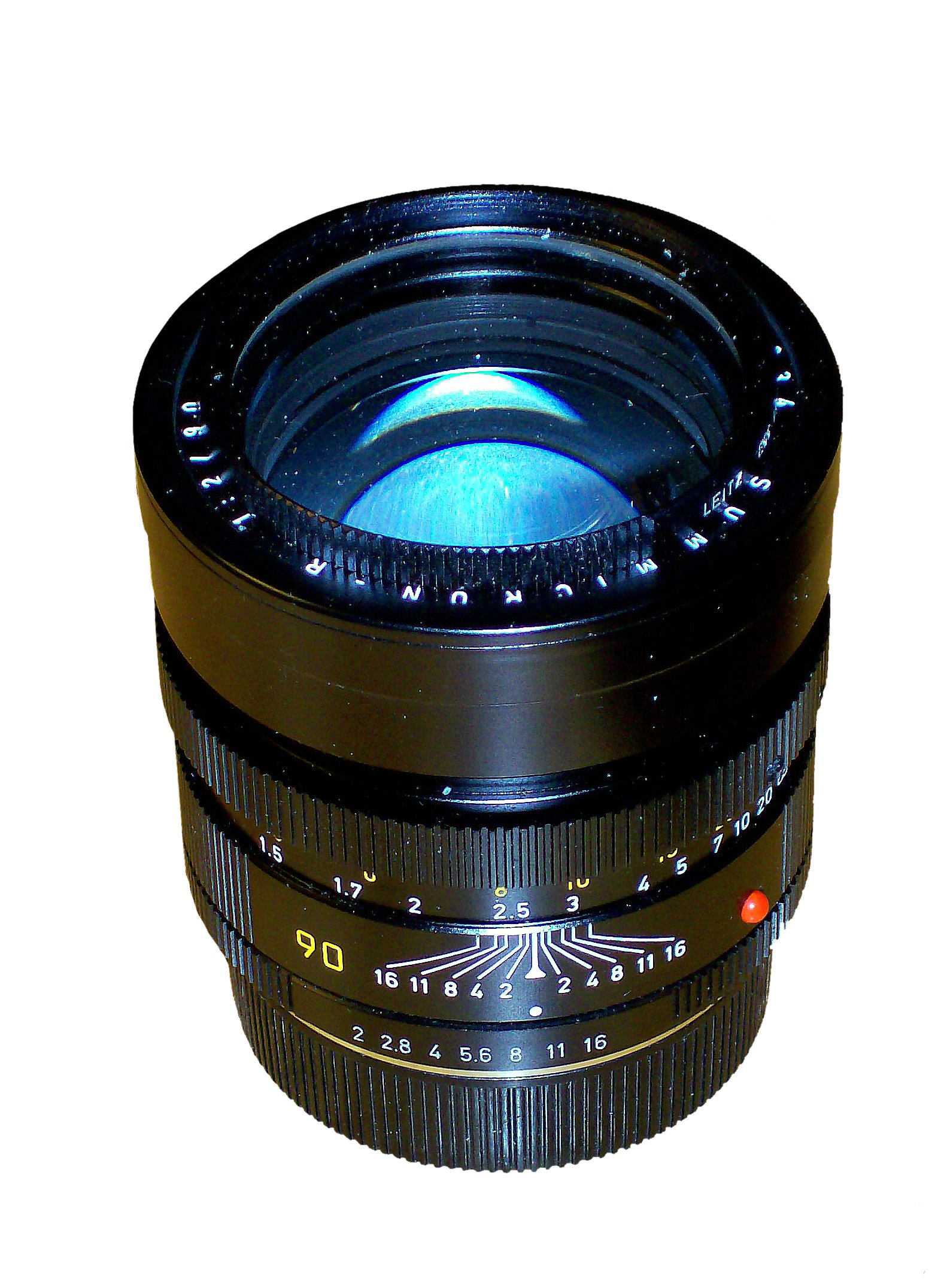 Leitz SUMMICRON-R 90mm/2